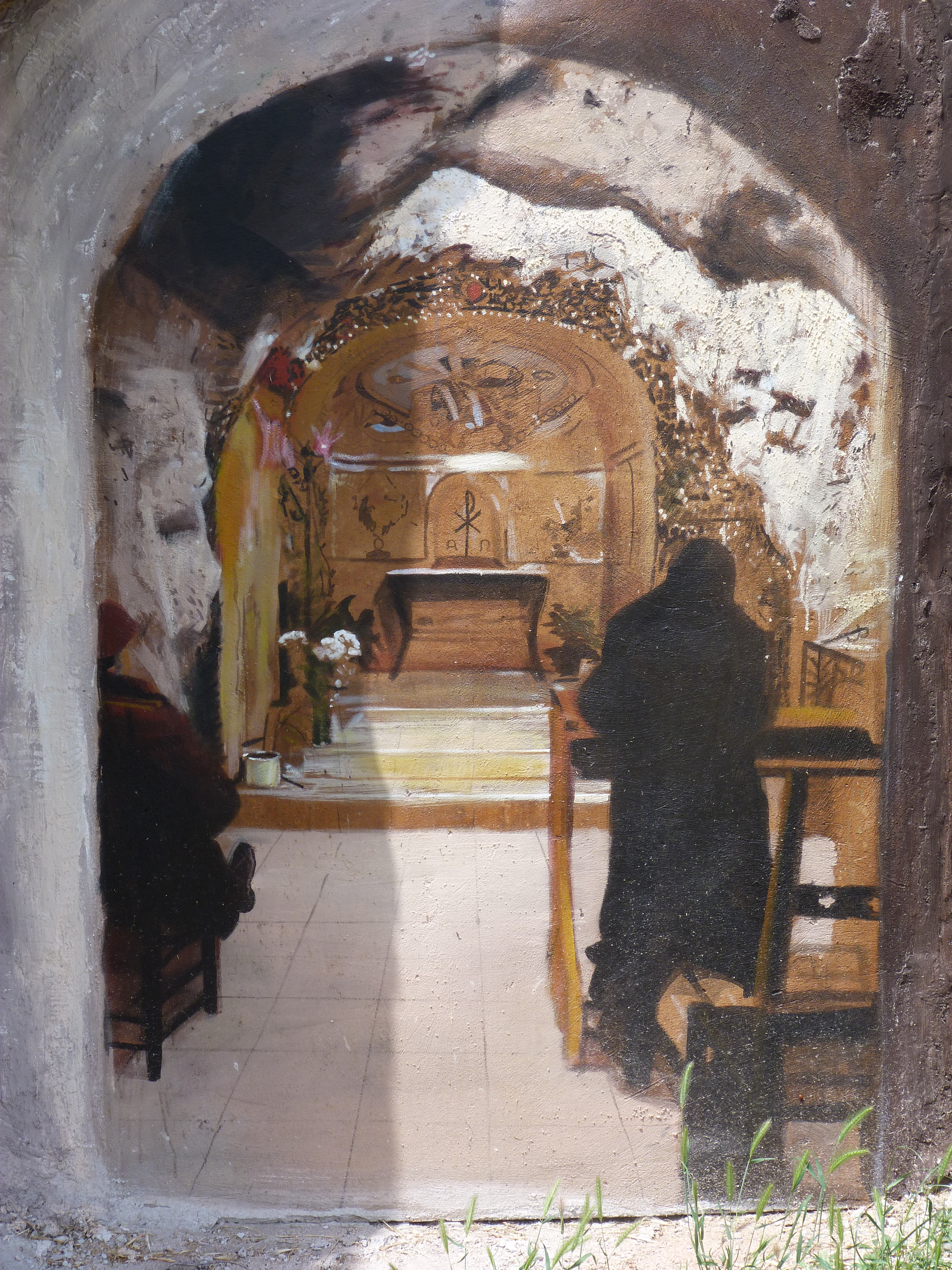 A felvétel Budapesten készült 2013. Június 4 –én kedden, a Gellérthegy oldalán levő graffitiről. László Dániel festőművész festette műteremben a szekkó pannót, azaz száraz vakolatra festett táblaképet, amelynek az alapja egy osb-lap. A képen a templom belső terét ábrázolta, amely egy kora keresztény barlangtemplom másolata. Olyan hatást kelt, mintha belátnánk a templom belsejébe. László a graffiti elhelyezéséhez mind az Önkormányzat mind pedig a Pálos rend engedélyét kérte. (1), graffiti (2), graffiti (3), a thébai sziklatemplom másolata a Budai Sziklatemplomban (4)Források: Így készült a klassz festmény ©© Published under Creative Commons in the Metapolisz DVD line. All of the photos and vids in the Metapolisz DVD line are under Creative Commons and can be used even for commercial – for profit – purposes. Recommended Citation Derzsi Elekes Andor: Metapolisz DVD line